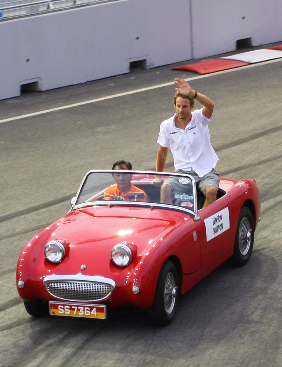 Jenson Button at Singapore GP Parade Lap